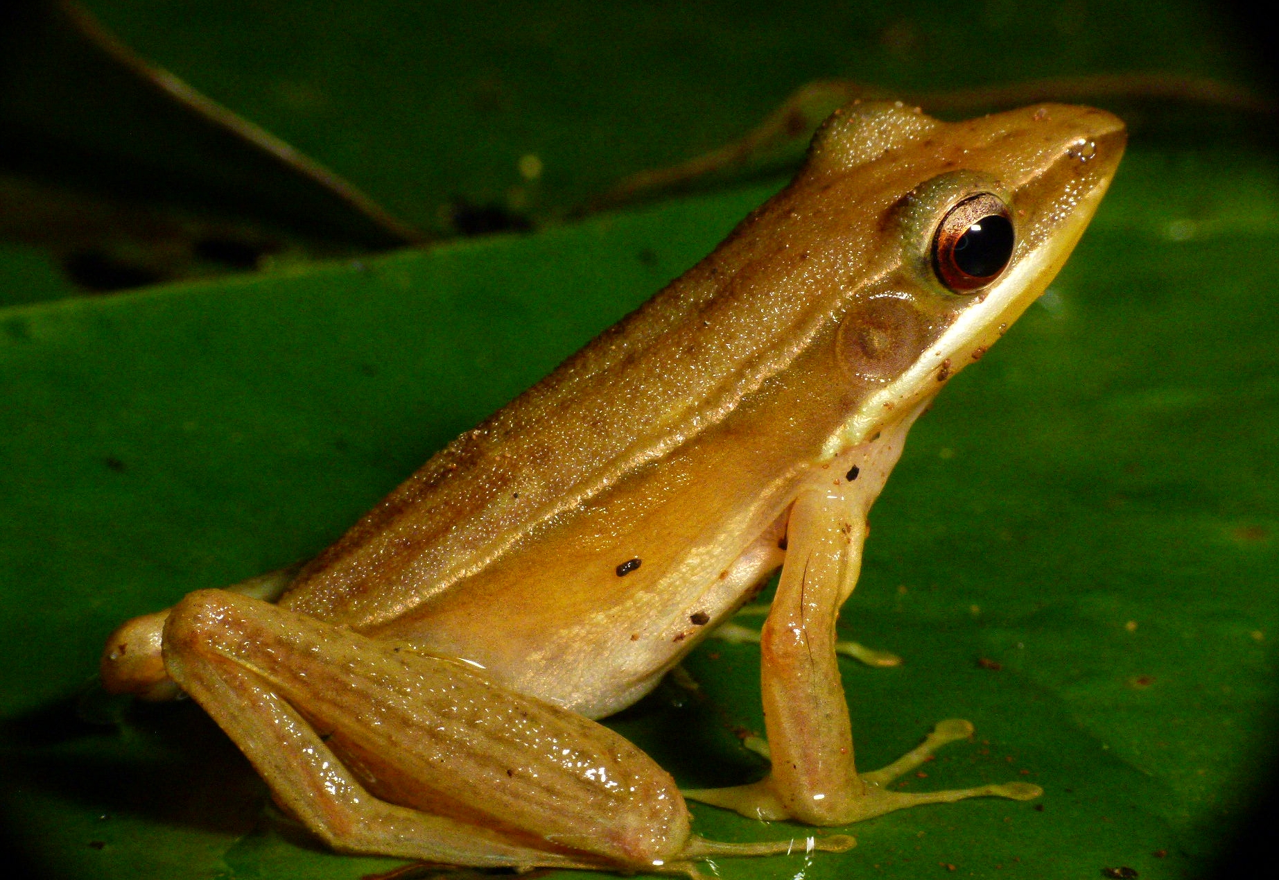 Hylarana aurantiaca. Western Ghats, Wayanad, India.